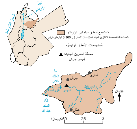 رسمٌ لِمُستجمع أمطار نهر الزرقاء.